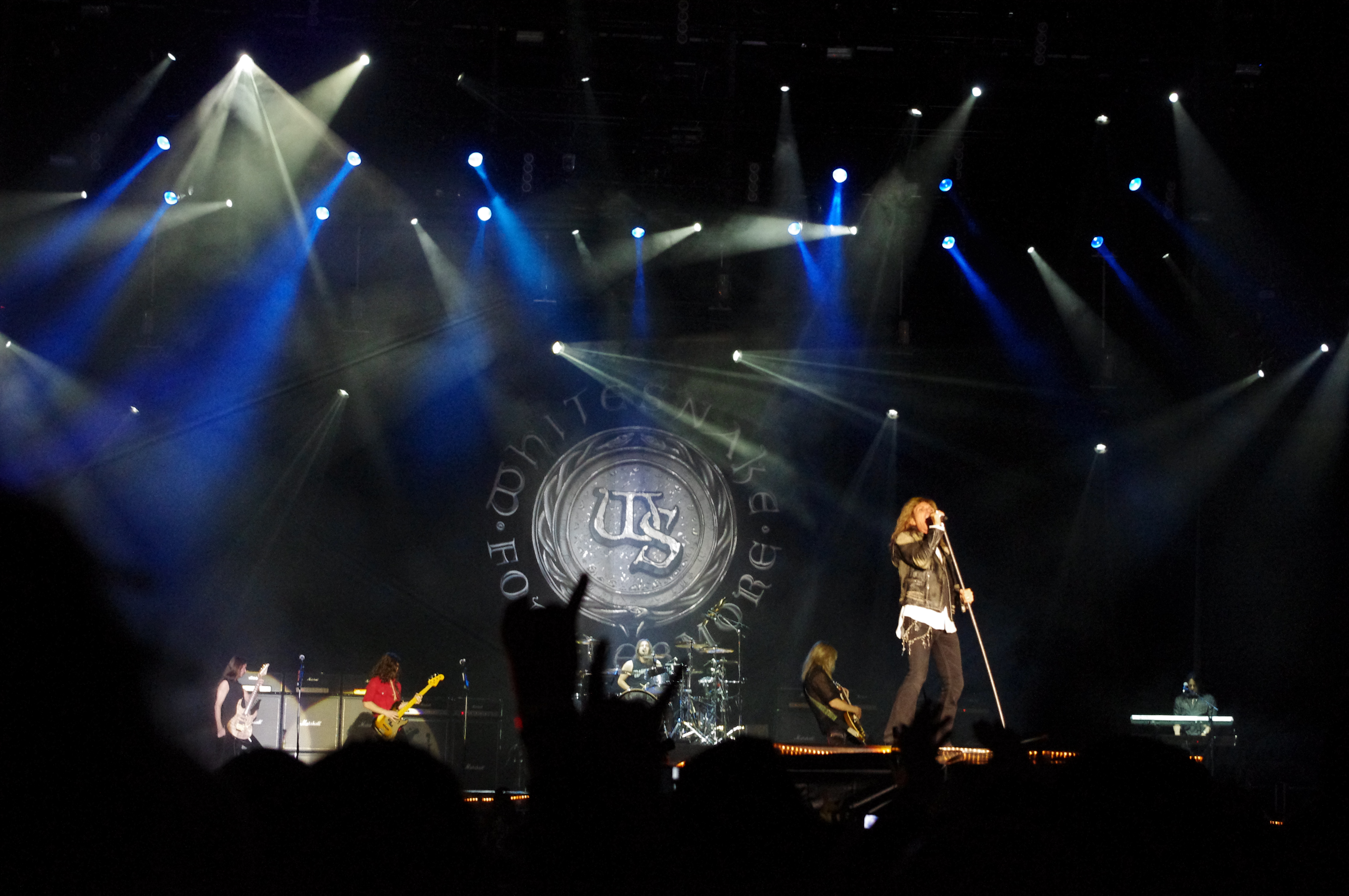 Whitesnake esiintymässä kesäkuussa 2011.